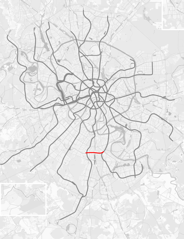 Каховская линия Московского метрополитена